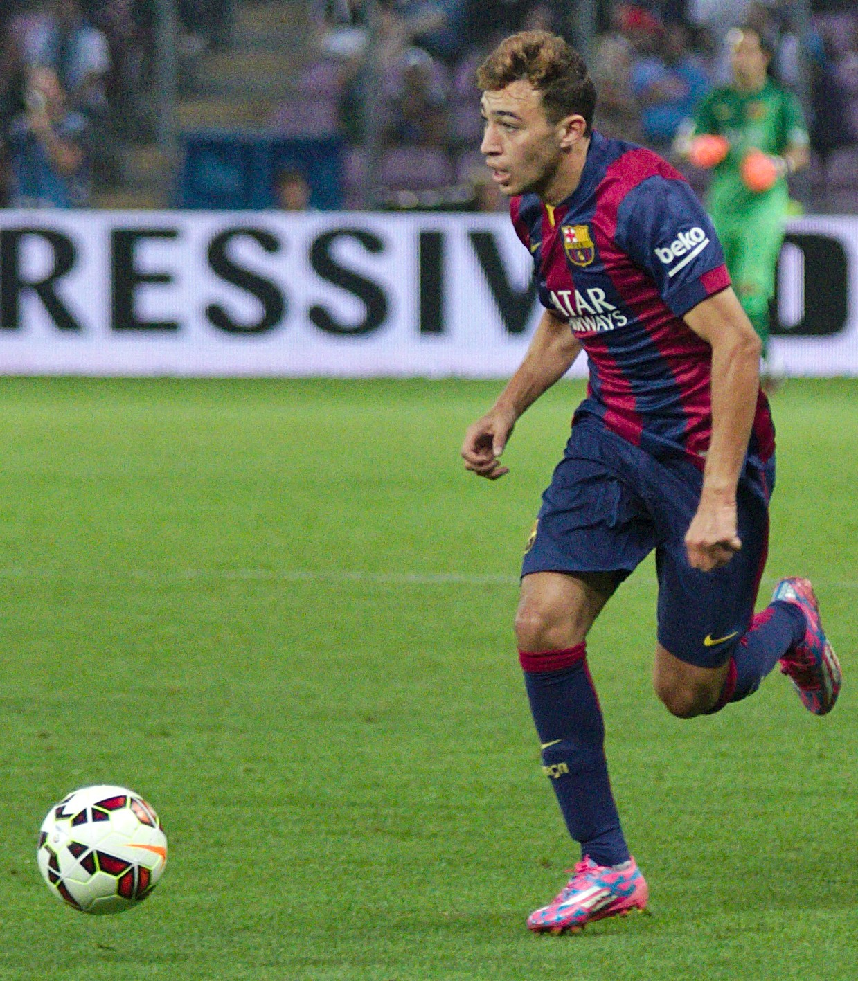 Barça - Napoli - 20140806